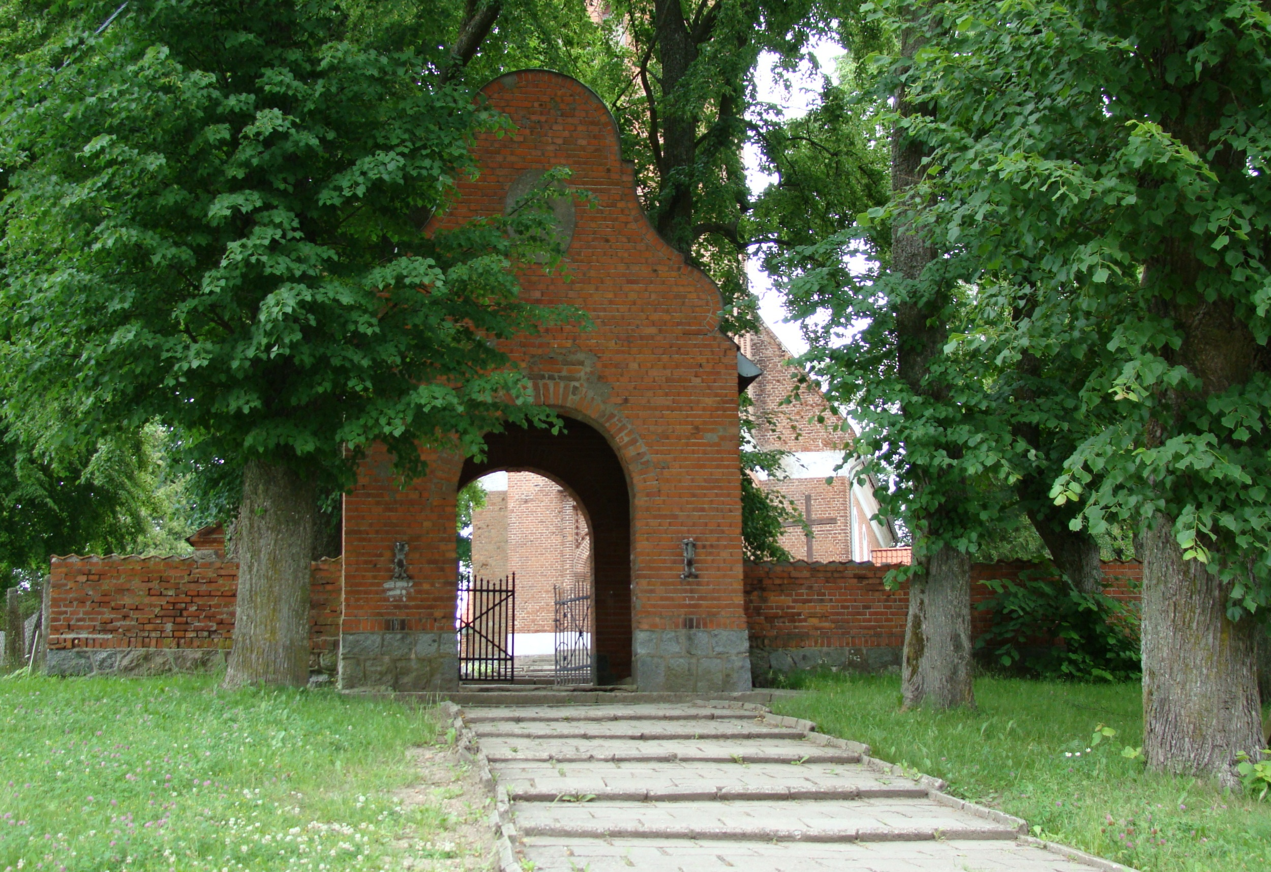 kościół parafialny p.w.św. Jakuba Apostoła nr. NID woj. warmińsko-mazurskie 832 z 1.09.1968